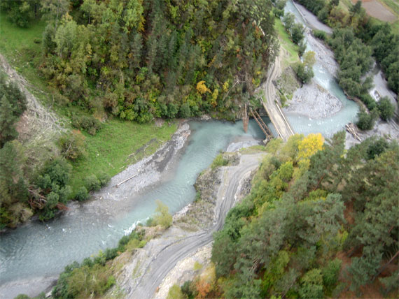 Alazani River